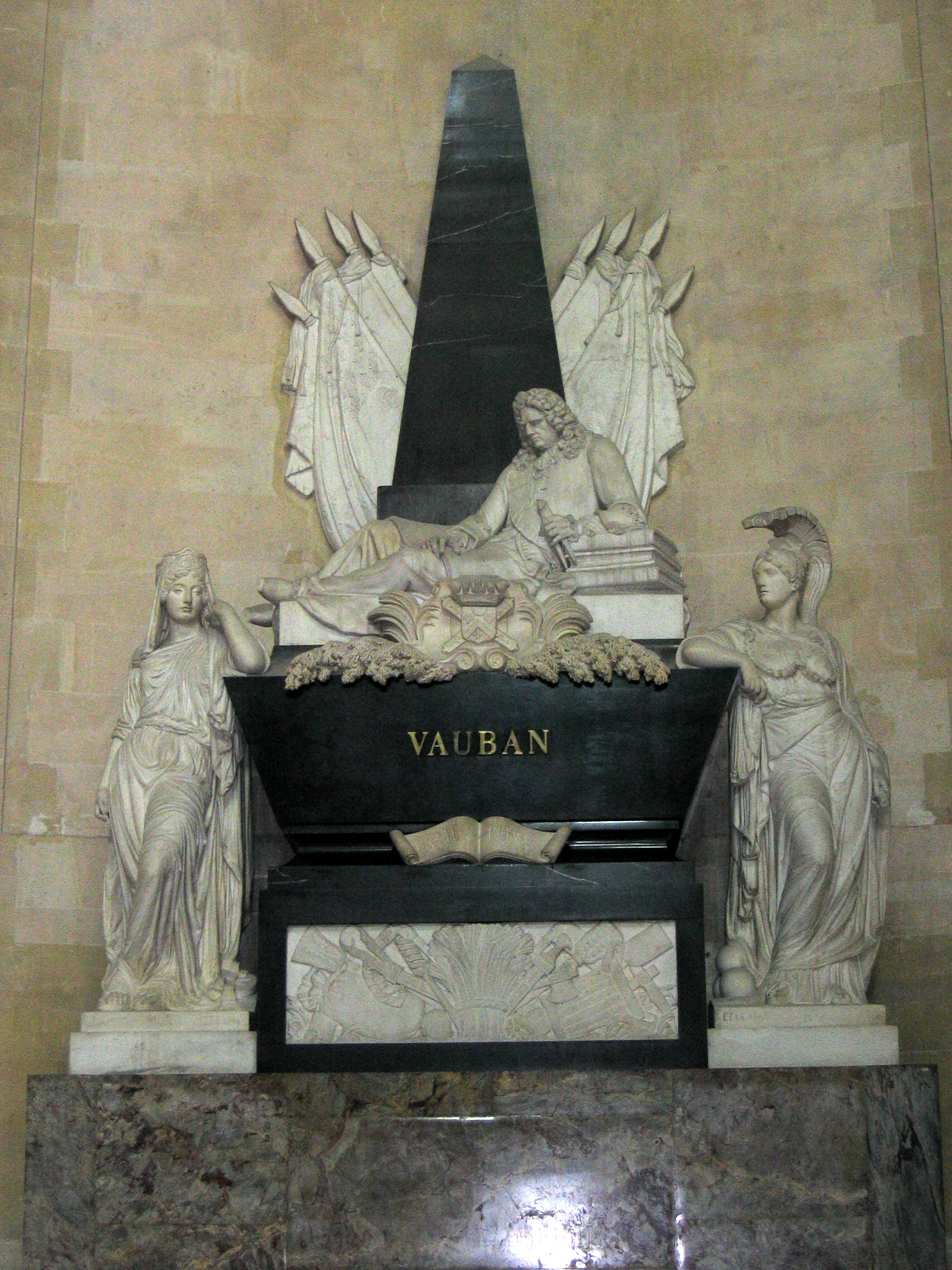 Monument de Vauban, chapelle Sainte-Thérèse du Dôme des Invalides, Hôtel national des Invalides, VIIe arrondissement, Paris, France